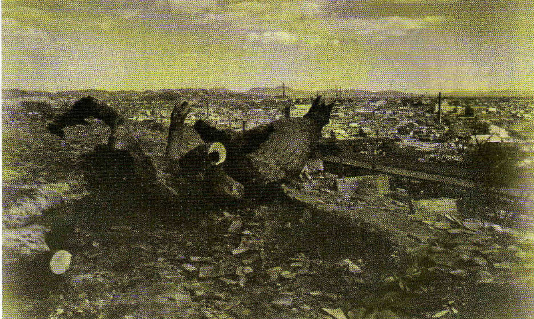 1945年にアメリカによる空襲で壊滅状態になった広島県福山市の市街地を福山城本丸南東から撮影した光景